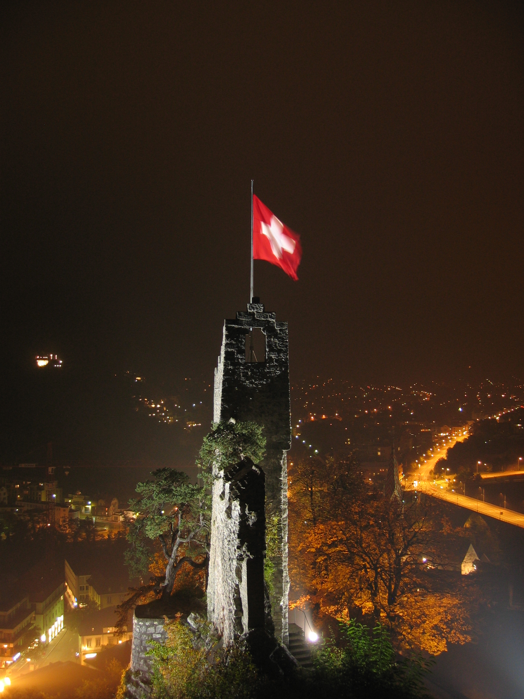 Nächtliche Beleuchtung der Ruine Stein in Baden, Schweiz, im Hintergrund Stadt Baden und darauffolgend Wettingen (mitte, rechts). Das Bild wurde für eine selbständige Vertiefungsarbeit zum Thema Lichtverschmutzung in Baden erstellt